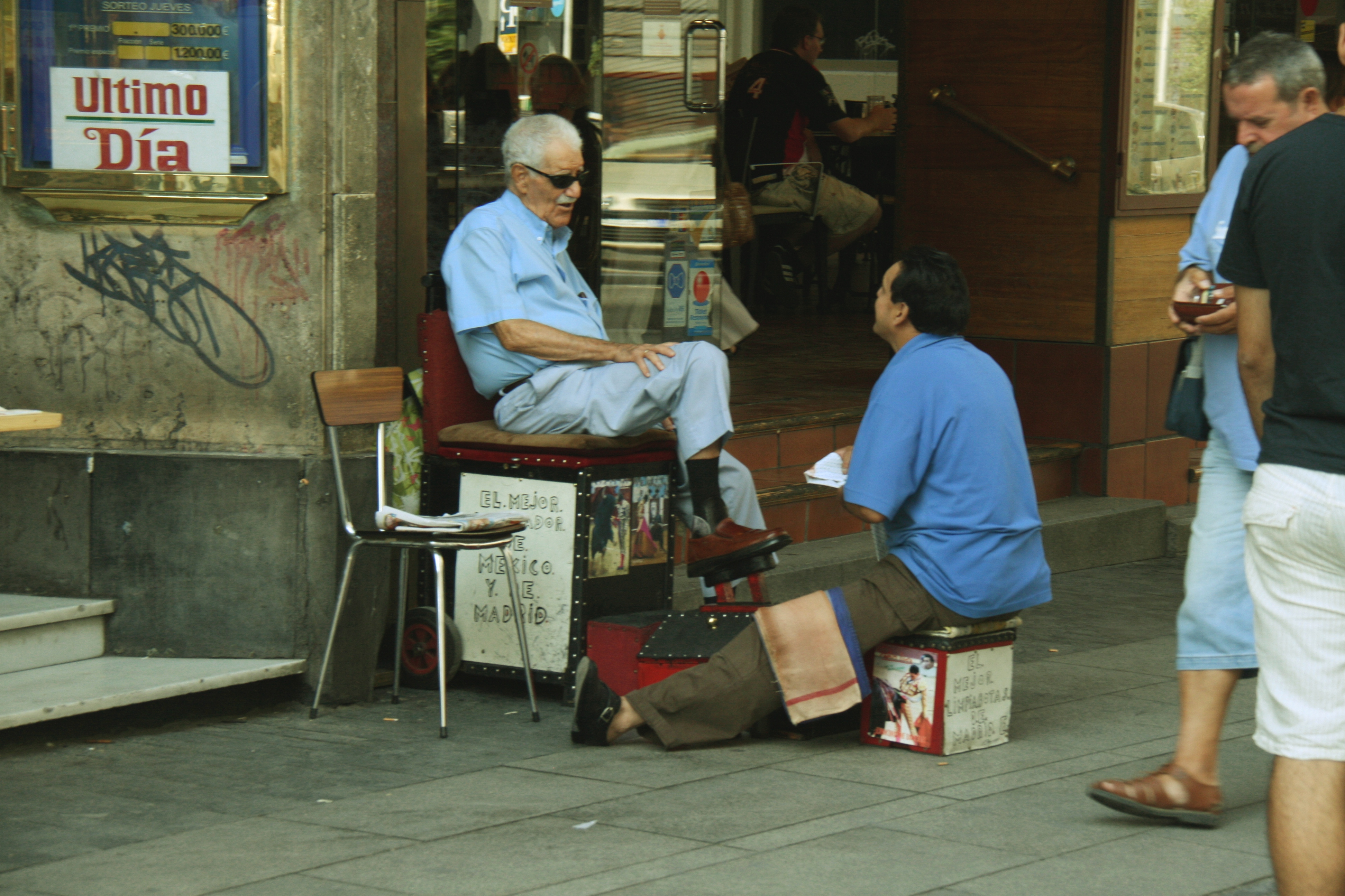 Limpiabotas (Madrid)